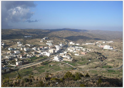 قرية خميس العرق .. أحد قرى قبيلة آل وليد بني شهر